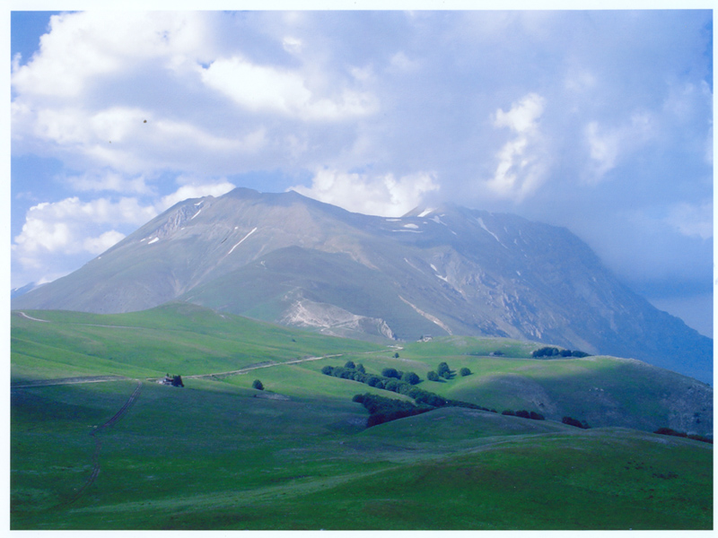 Forca di Presta. Nella zona dopo il rifugio è visibile anche una piccola villetta di montagna.